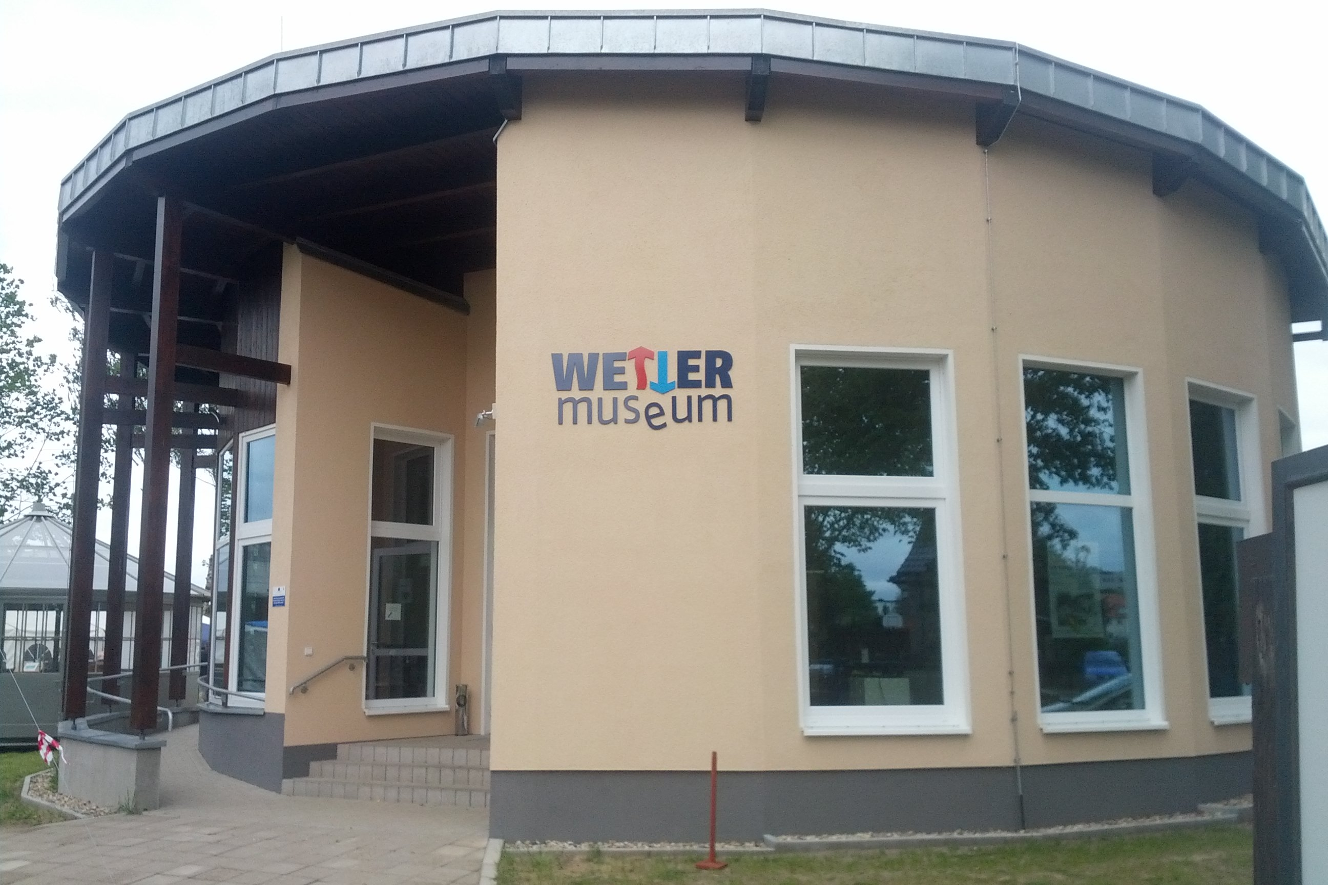 Wettermuseum Lindenberg - Eingang zum Besucherzentrum